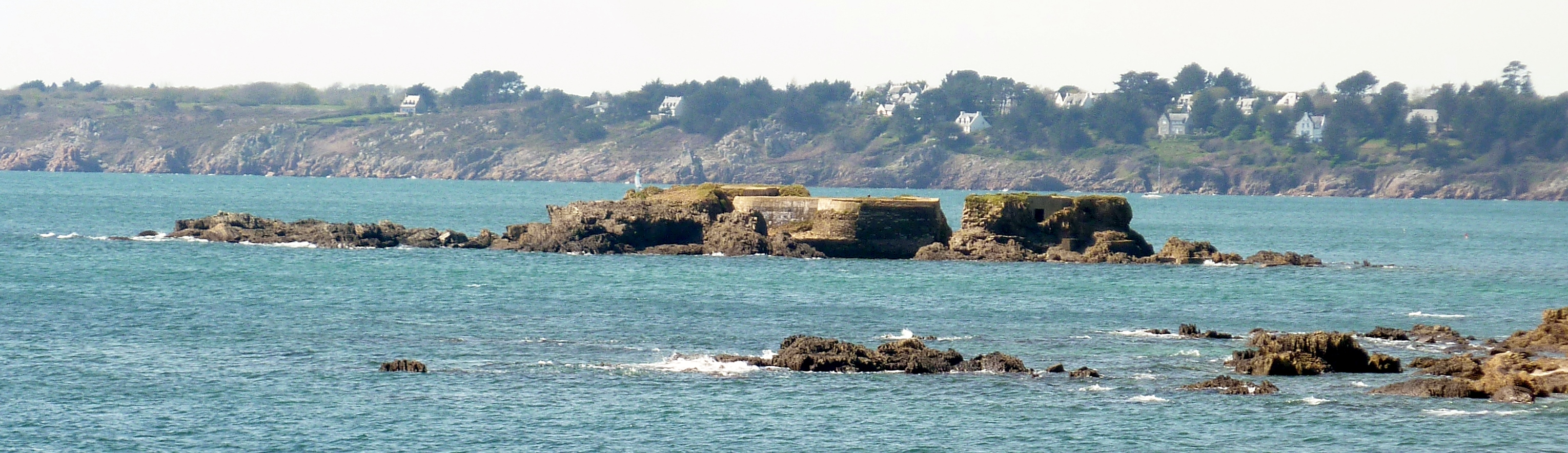 Moëlan-sur-Mer : l'Île Percée vue de l'est.